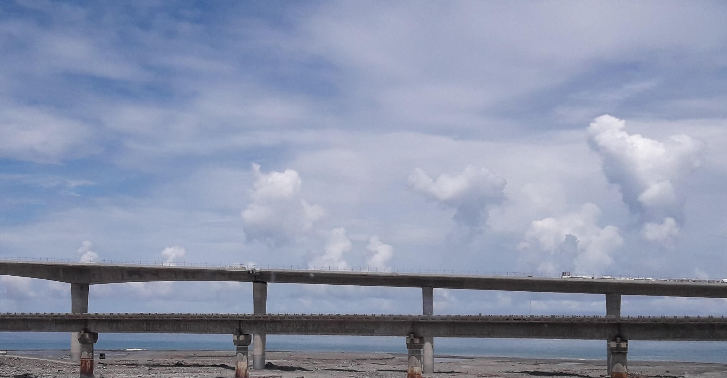 臺9線南迴改新建金崙高架橋。